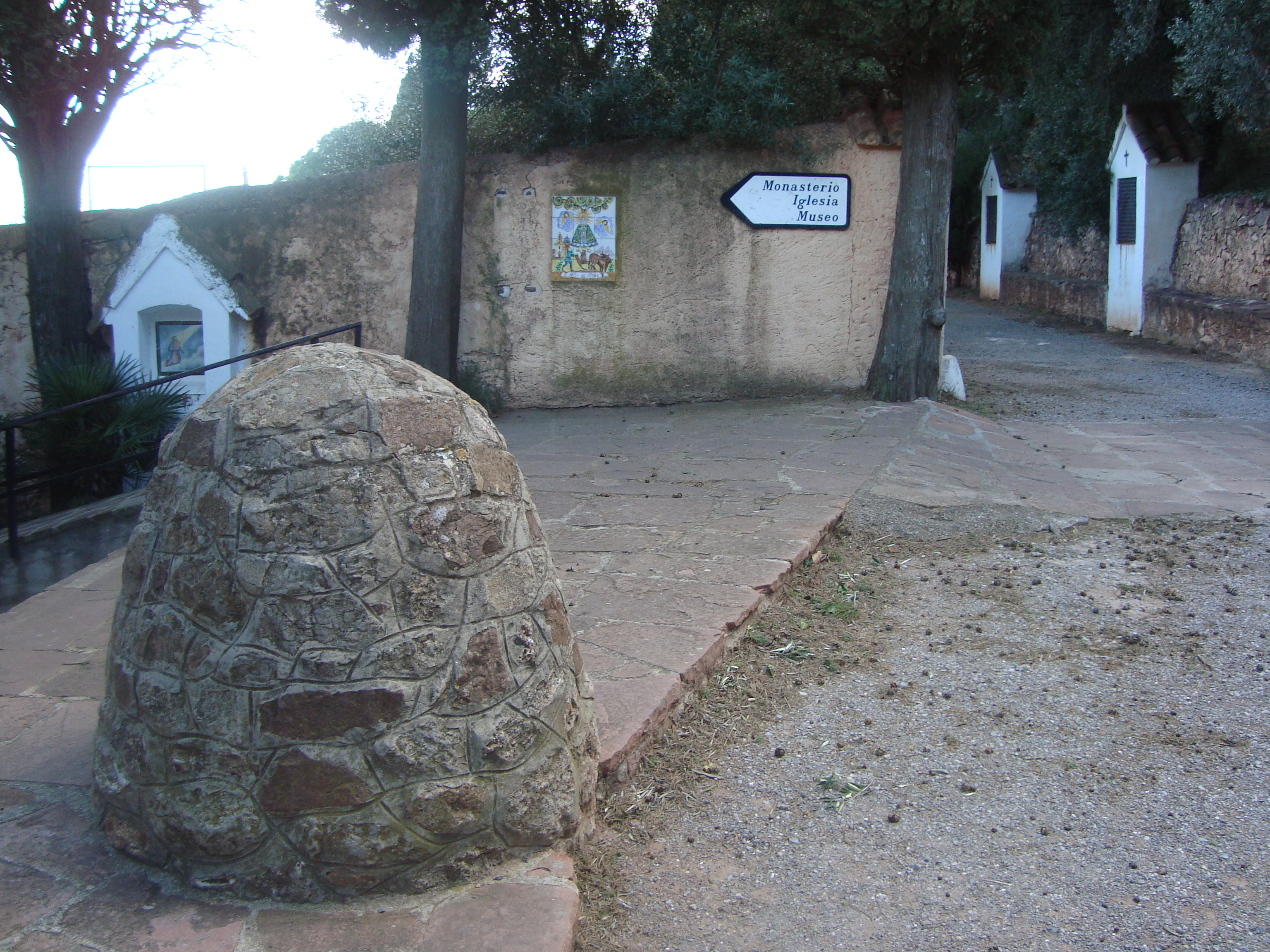 Calvari de Convent Nou (Benicàssim)